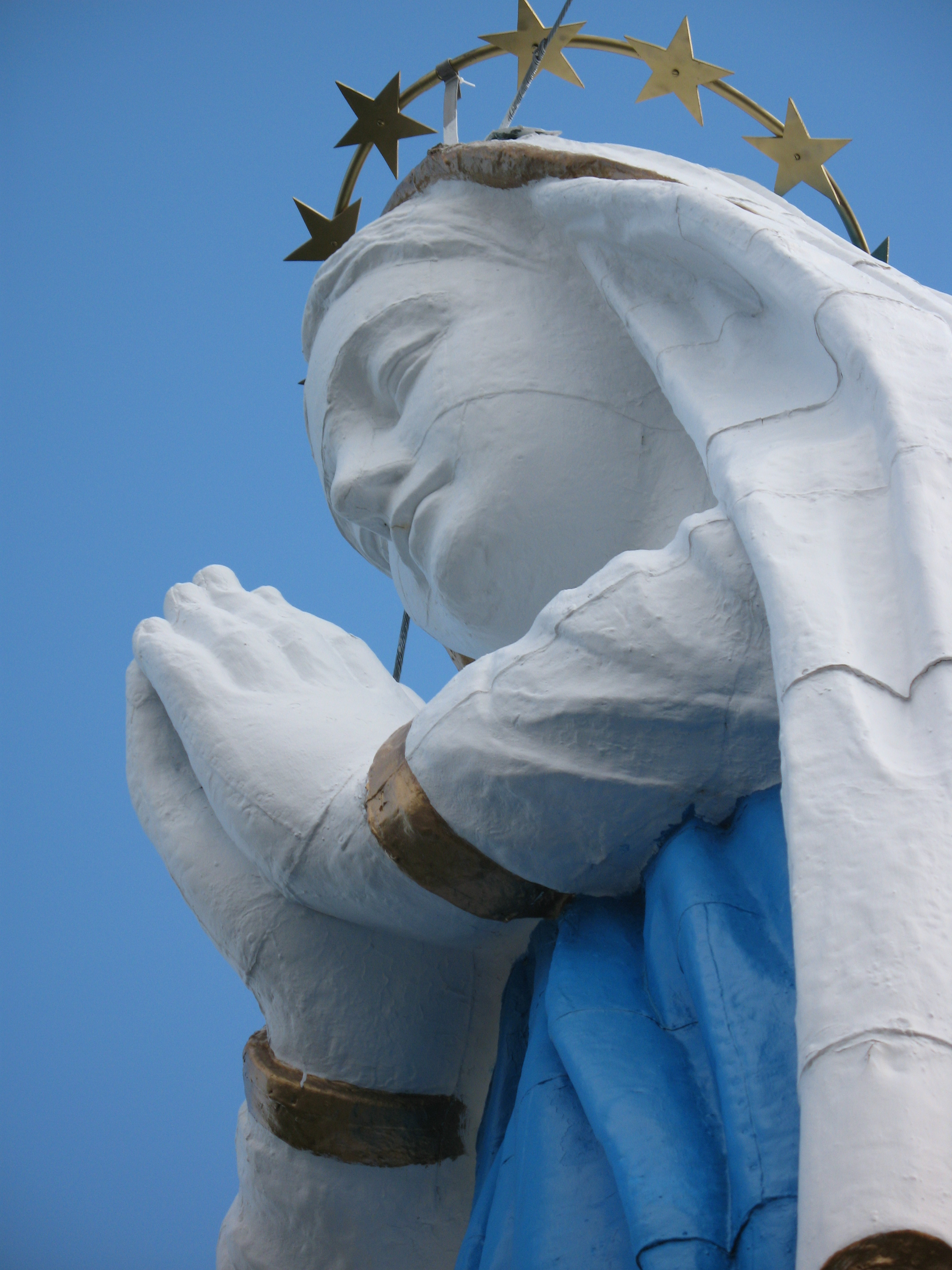 Statue Notre-Dame-Du-Saguenay Rivière-Éternité / Québec / Canada Parc national du Saguenay, vue côté est du fjord